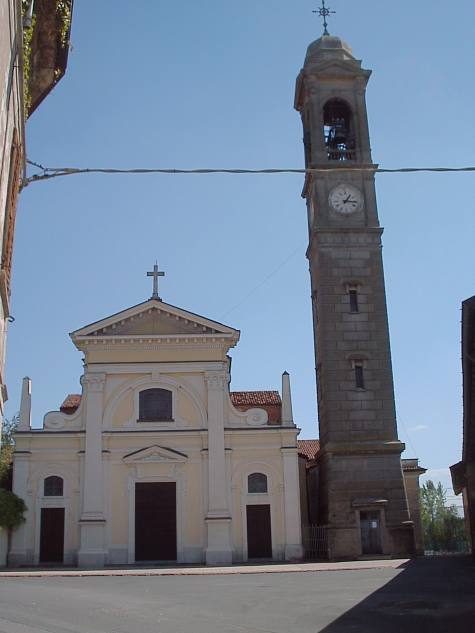 Chiesa parrocchiale di Casalsigone con torre campanaria